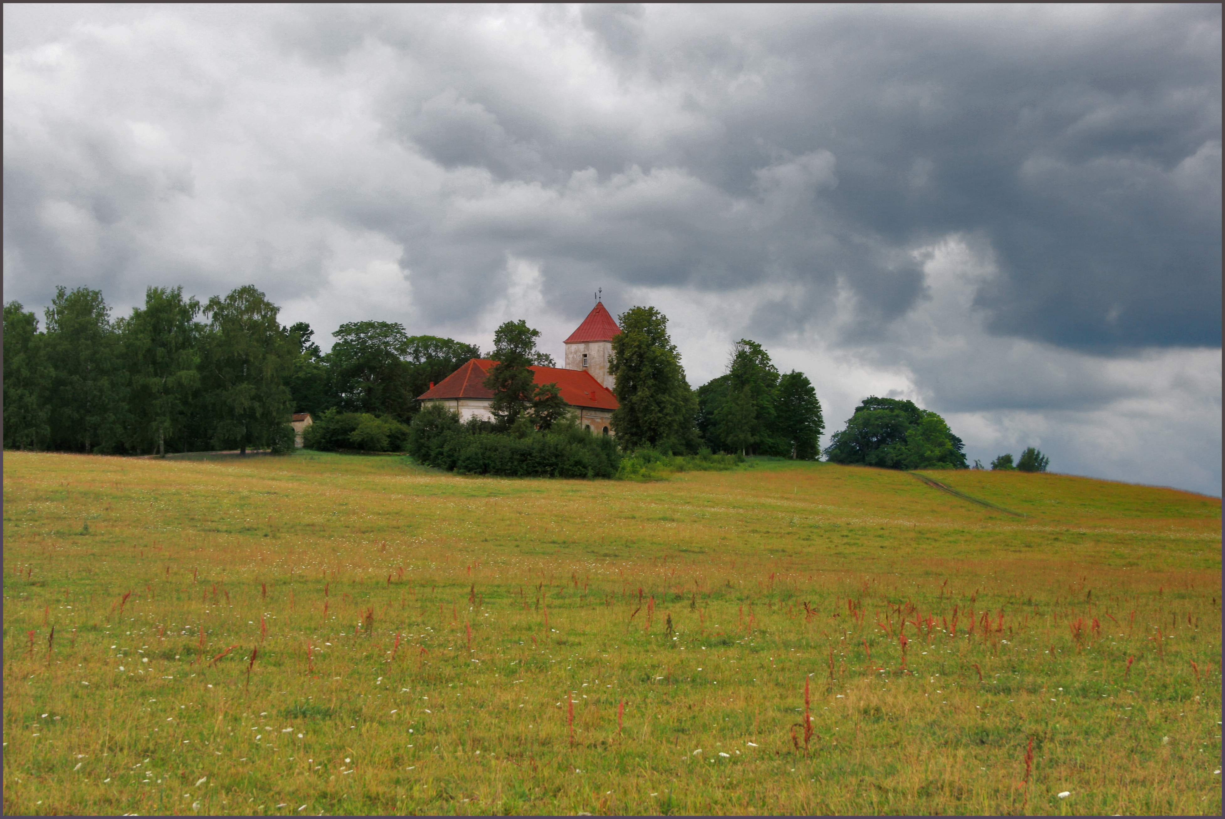 Vecsāti church